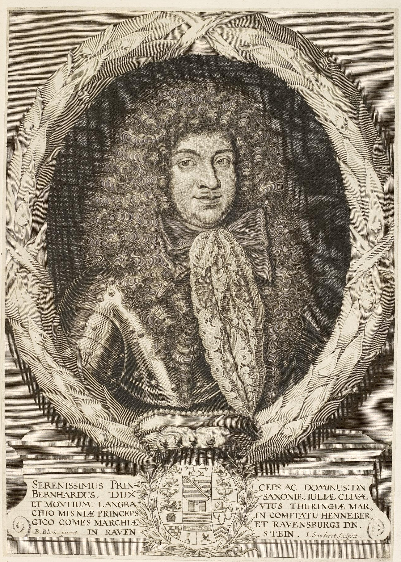 Grafik aus dem Klebeband Nr. 1 der Fürstlich Waldeckschen Hofbibliothek Arolsen Motiv: Bernhard von Sachsen-Jena, Herzog des Herzogtums Sachsen-Jena.